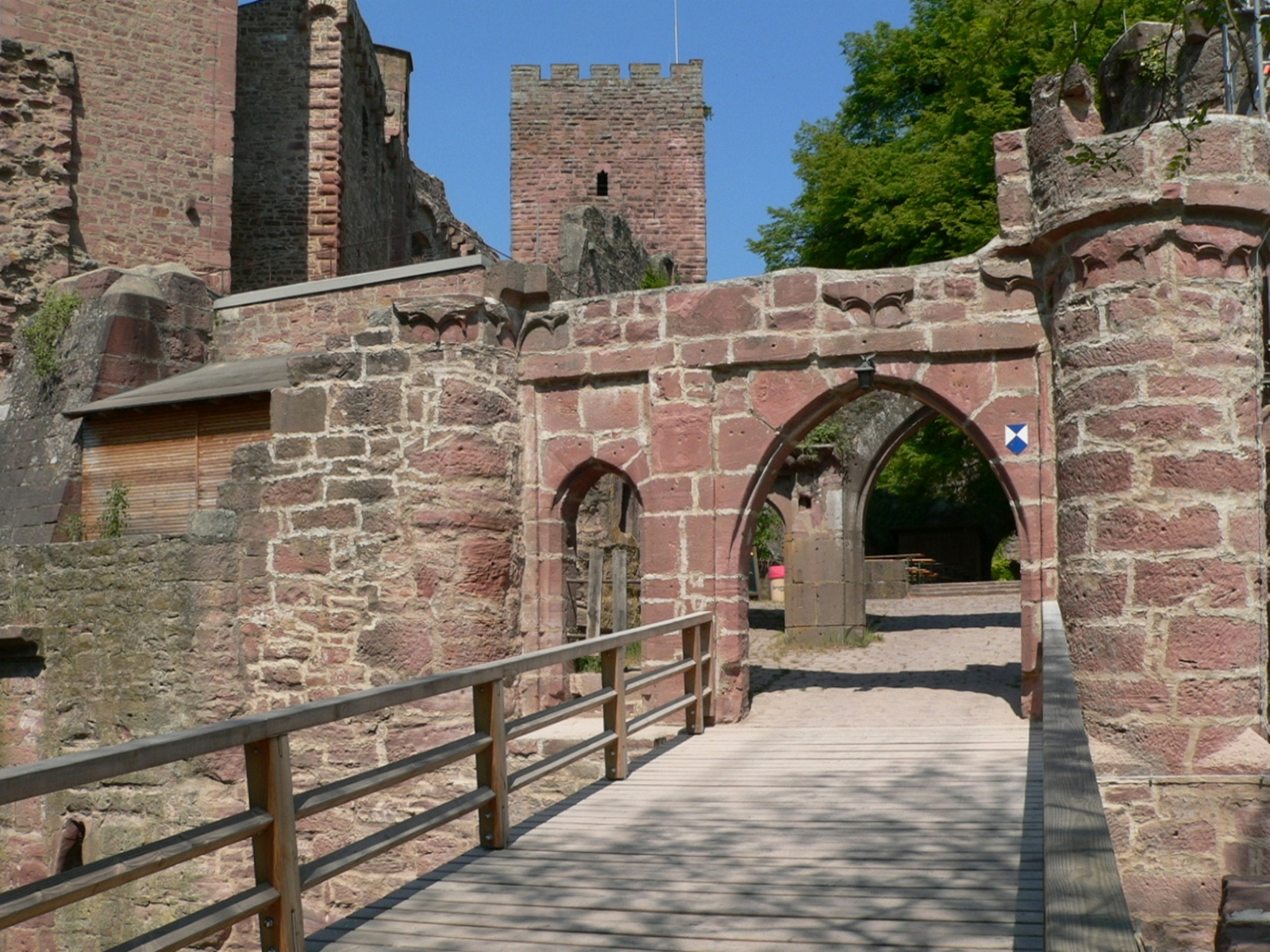 Henneburg oberhalb von Stadtprozelten am Main, Germany - Torbau, Eingang zur Vorburg